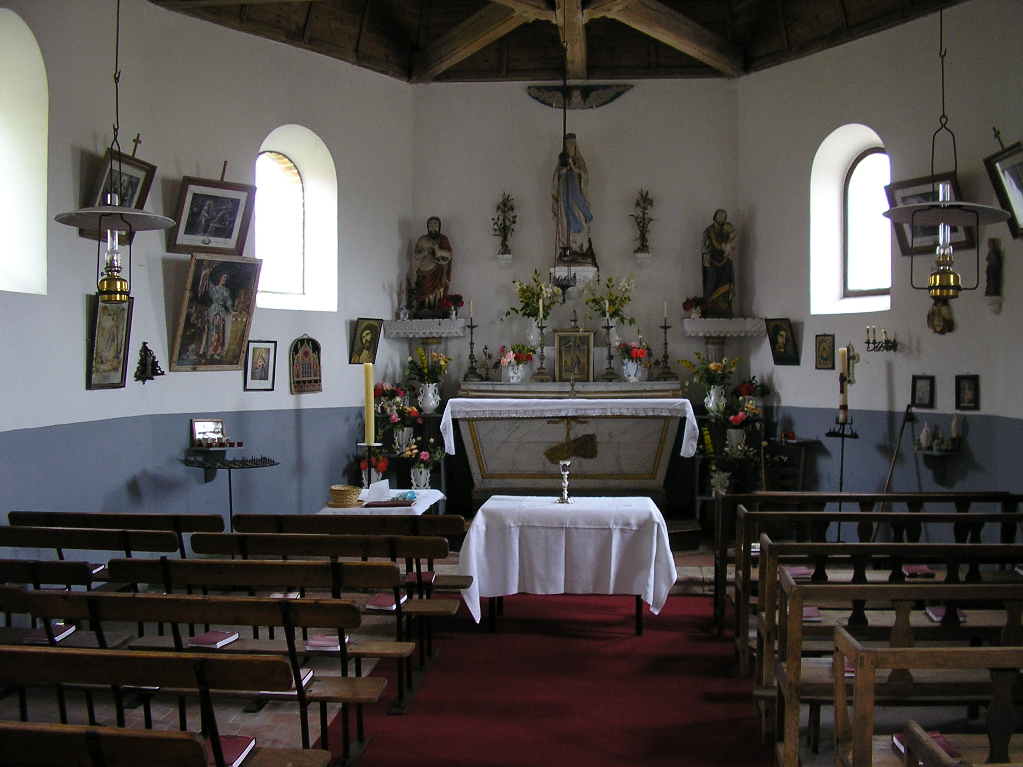 Chapelle Saint-Jean-Baptiste, Sours, Eure-et-Loir (France).